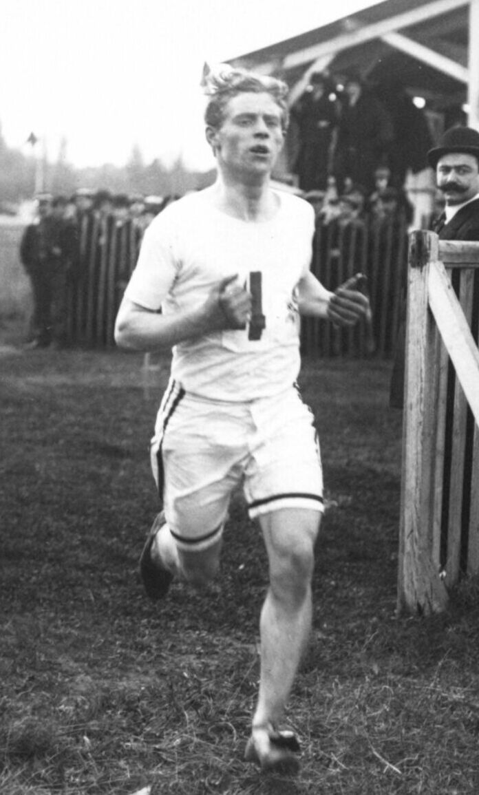 24-03-13, Juvisy, cross des cinq nations [E. Glover représentant de l'équipe d'Angleterre courant sur le terrain de l'aérodrome de Juvisy] : [photographie de presse] / [Agence Rol]